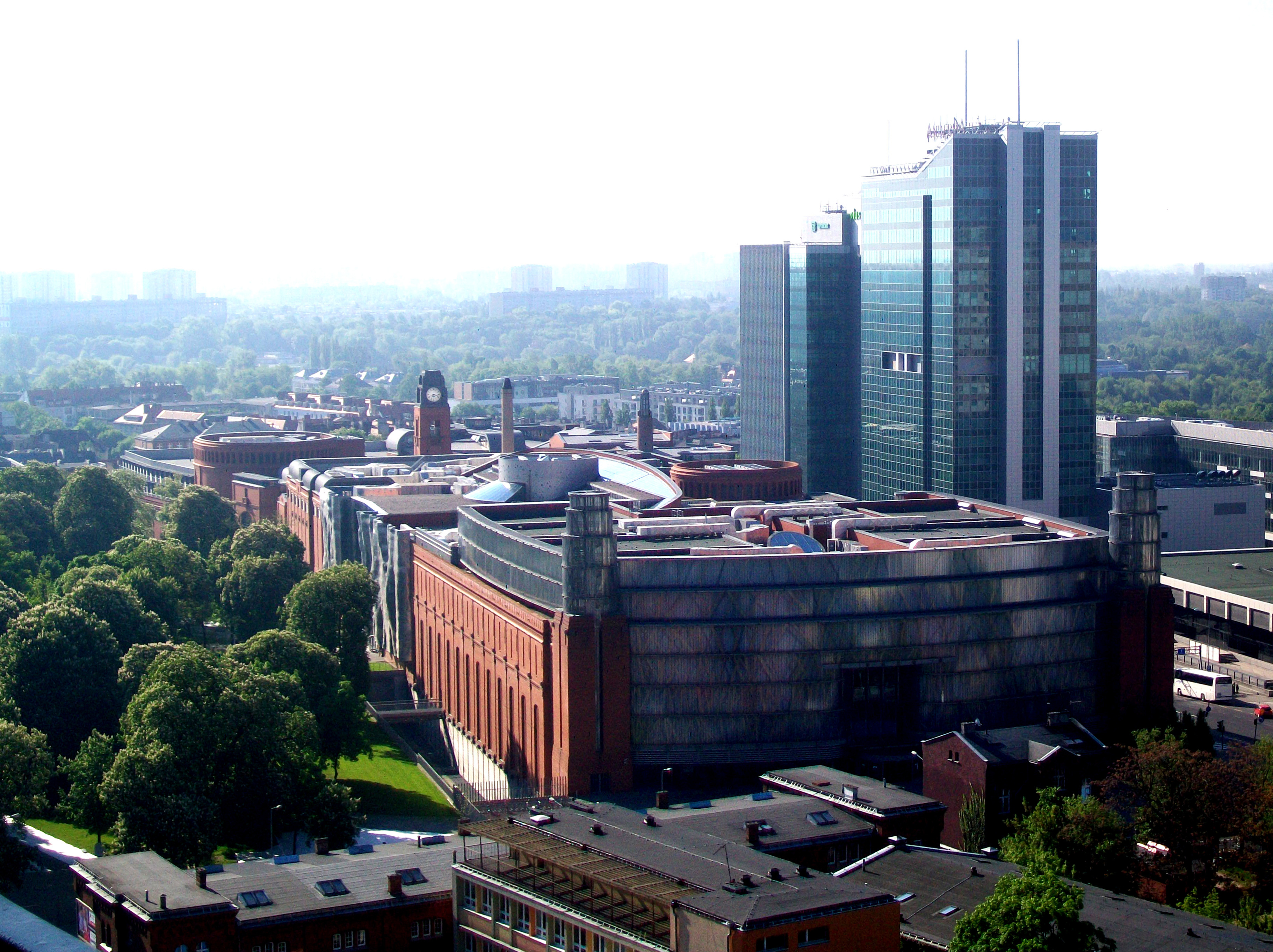 Stary Browar w Poznaniu widziany z 13. piętra Collegium Altum Uniwersytetu Ekonomicznego